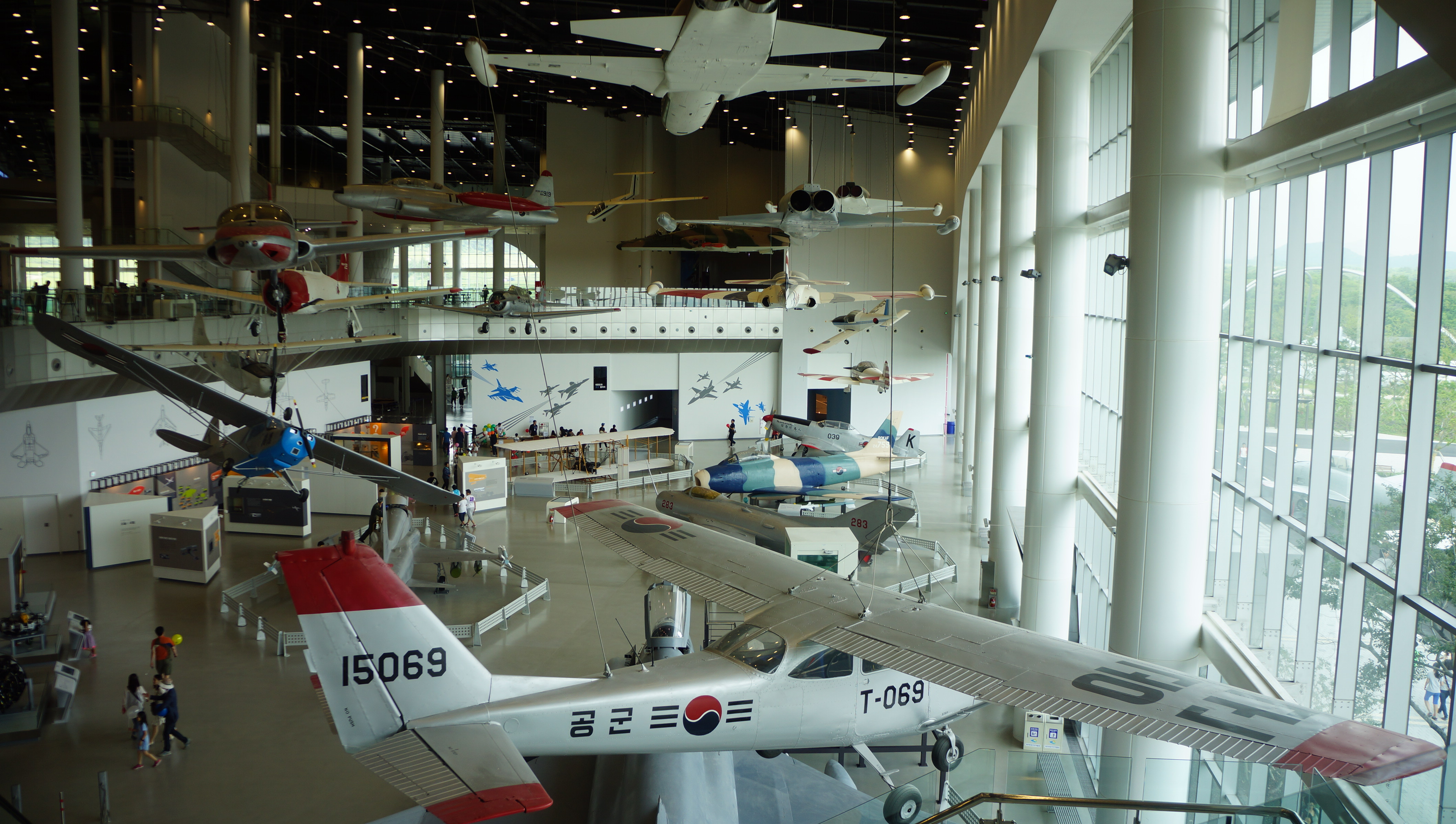 大韓民国 済州特別自治道 西帰浦市安徳面 済州航空宇宙博物館 1階 航空歴史館。 2014年6月6日撮影。